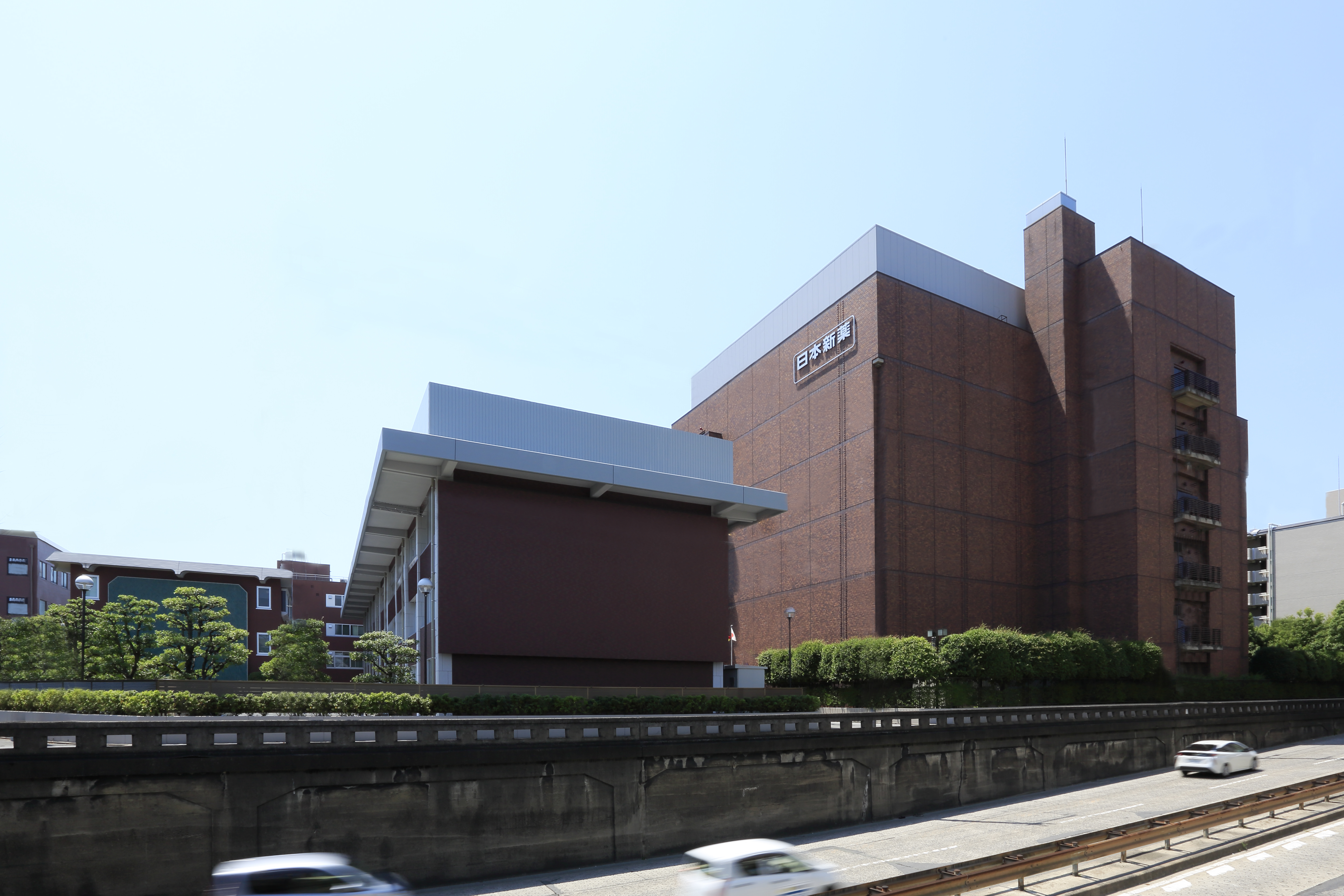 日本新薬本社外観＿西大路通り